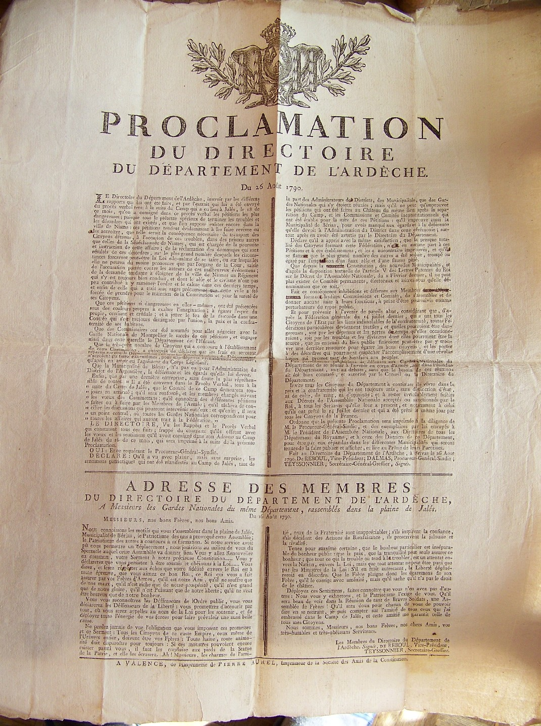 Proclamation du Directoire de l'Ardèche à la suite du premier camp de Jalès.